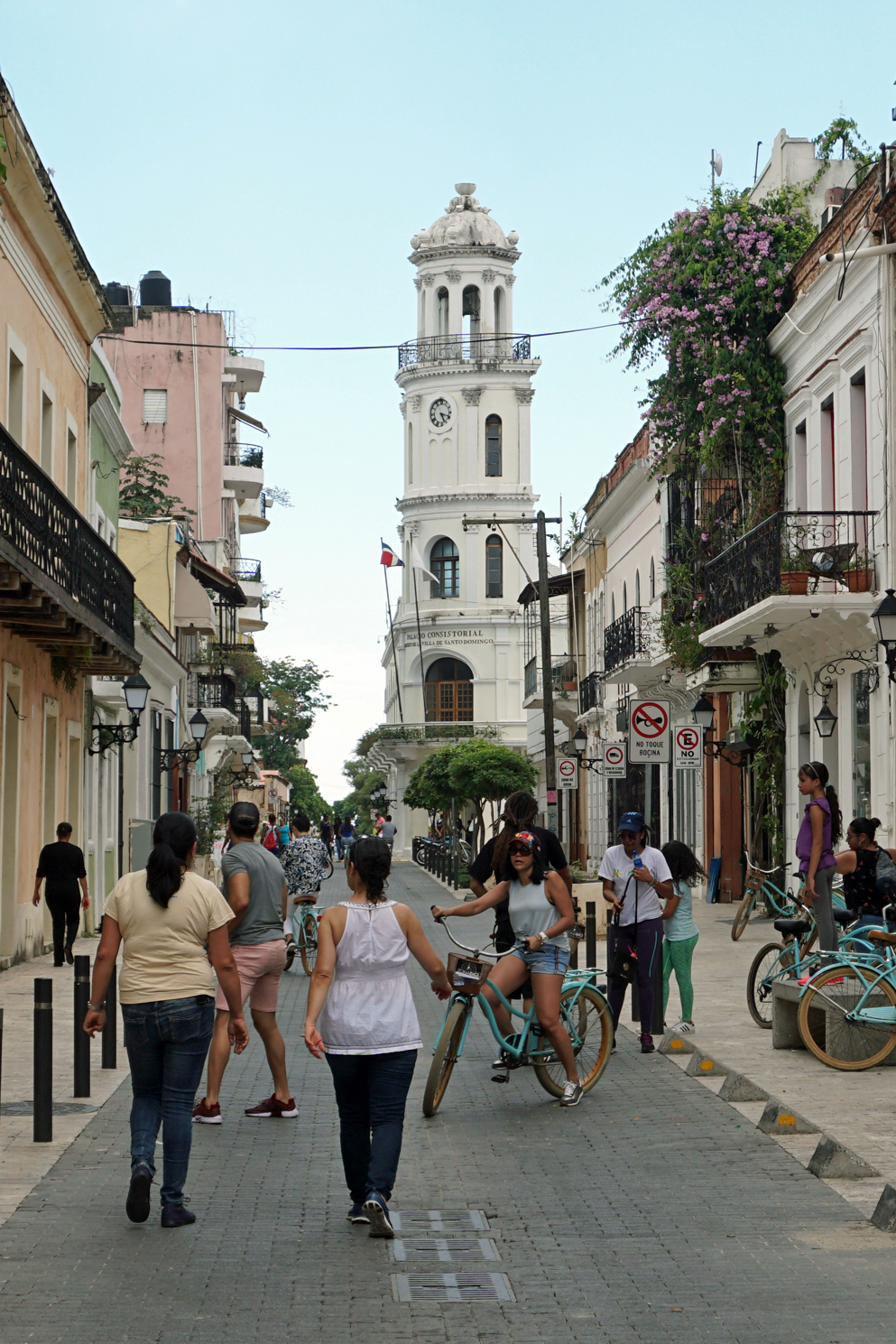 Calle Arzobispo Meriño, Ciudad Colonial de Santo Domingo. El Palacio Consistorial al fondo.